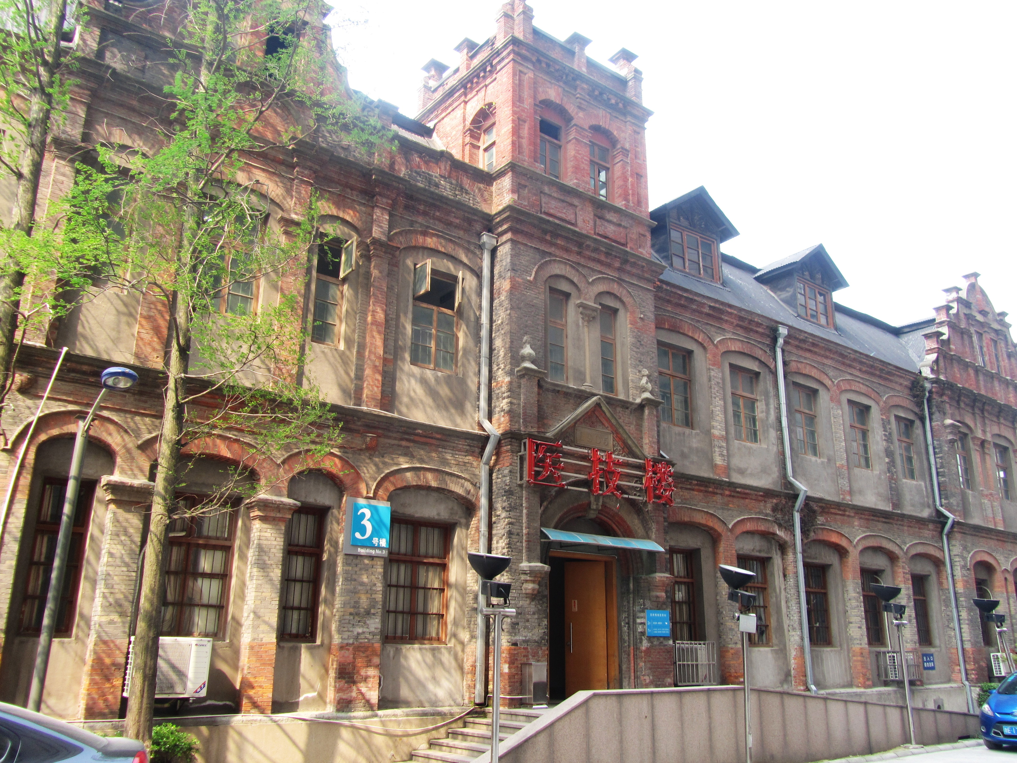 湖郡女校旧址，西楼南面。